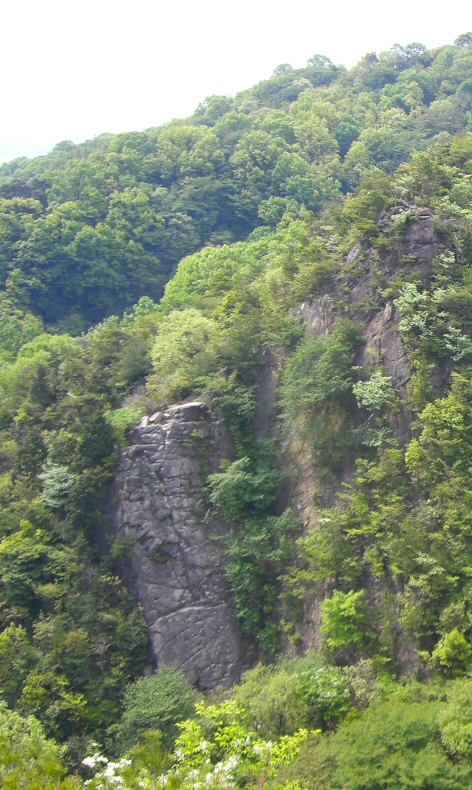 Rock-Garden in Mount Rokko; 六甲山のロックガーデン